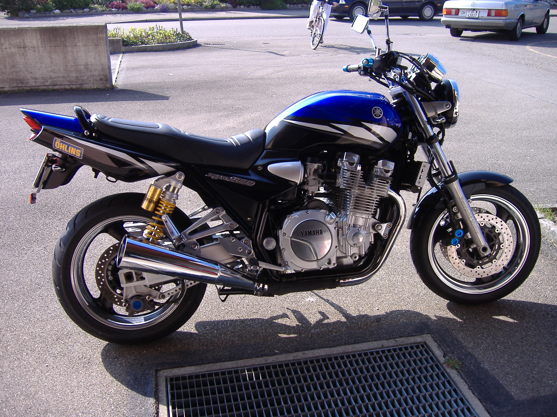 Yamaha XJR 1300 Jg. 2003